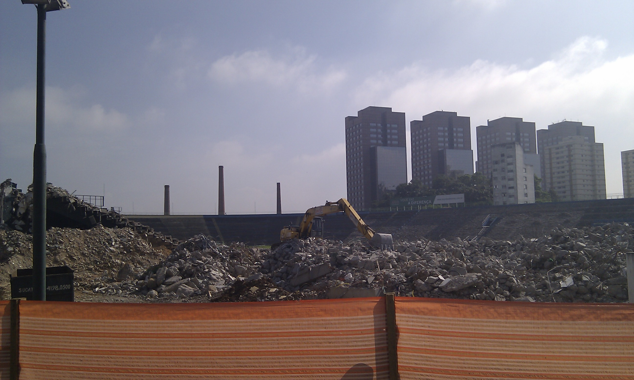 Início das obras de demolição do Estádio Palestra Itália para a construção do Allianz Parque.